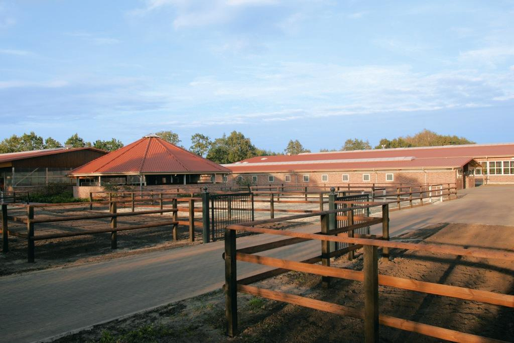 Pferdehaltung, Pensions- und Ausbildungsstall in Schleswig-Holstein